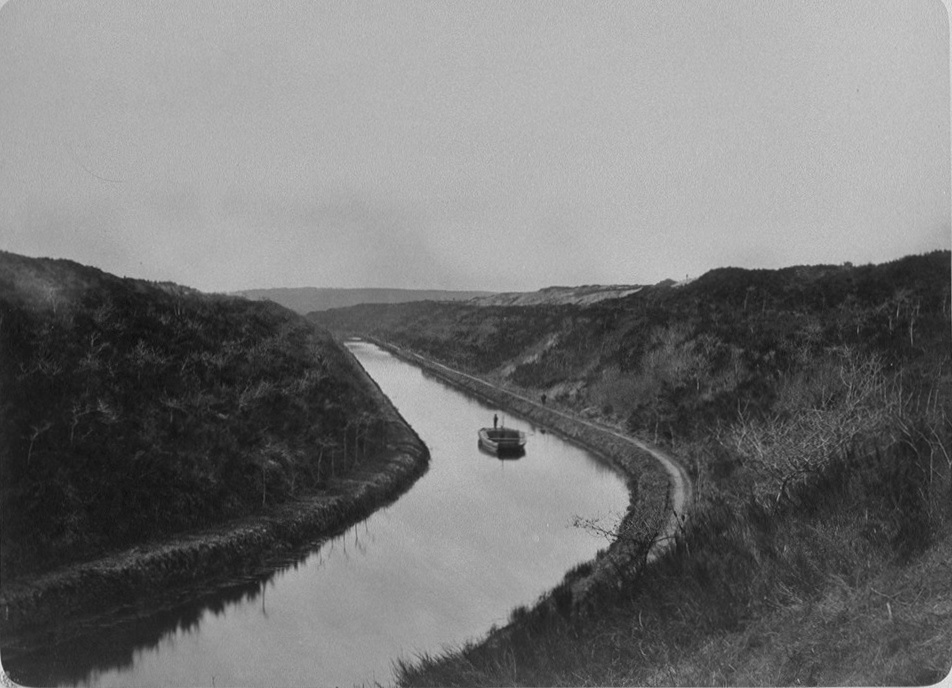 La tranchée de Glomel (canal de Nantes à Brest), vue prise du côté Nantes en direction de l'ouest ; photographie prise entre 1890 et 1895 par J. Duclos.